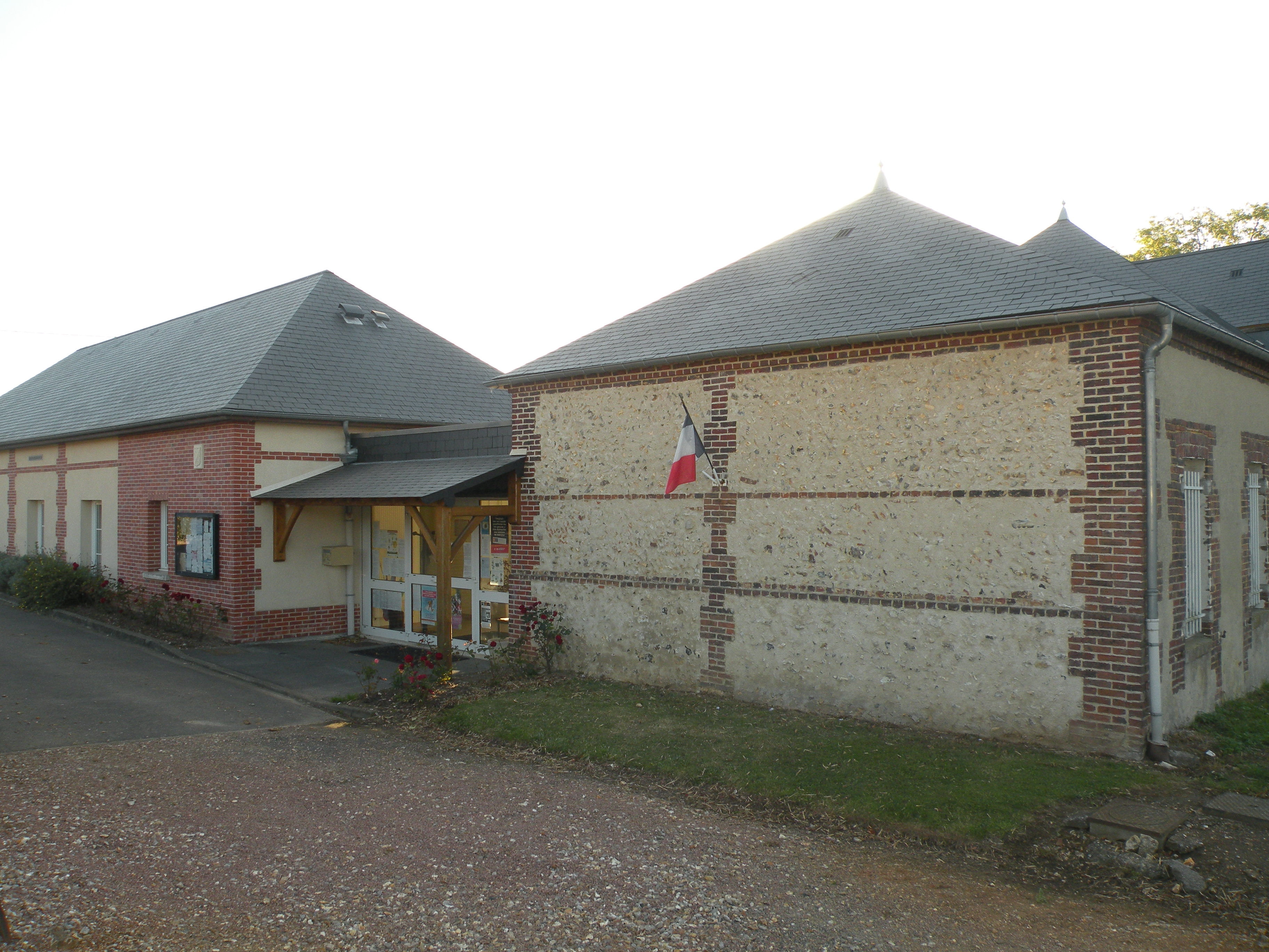 mairie Beaumont-les-Nonains